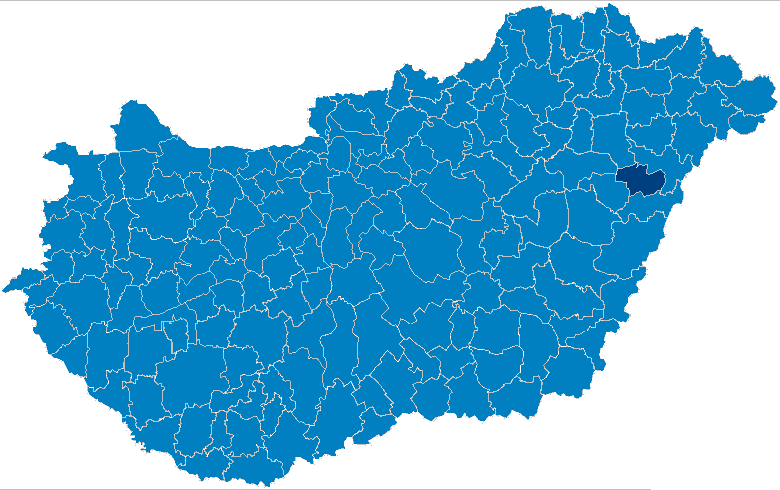 Lage des Kleingebietes Debrezin in Ungarn